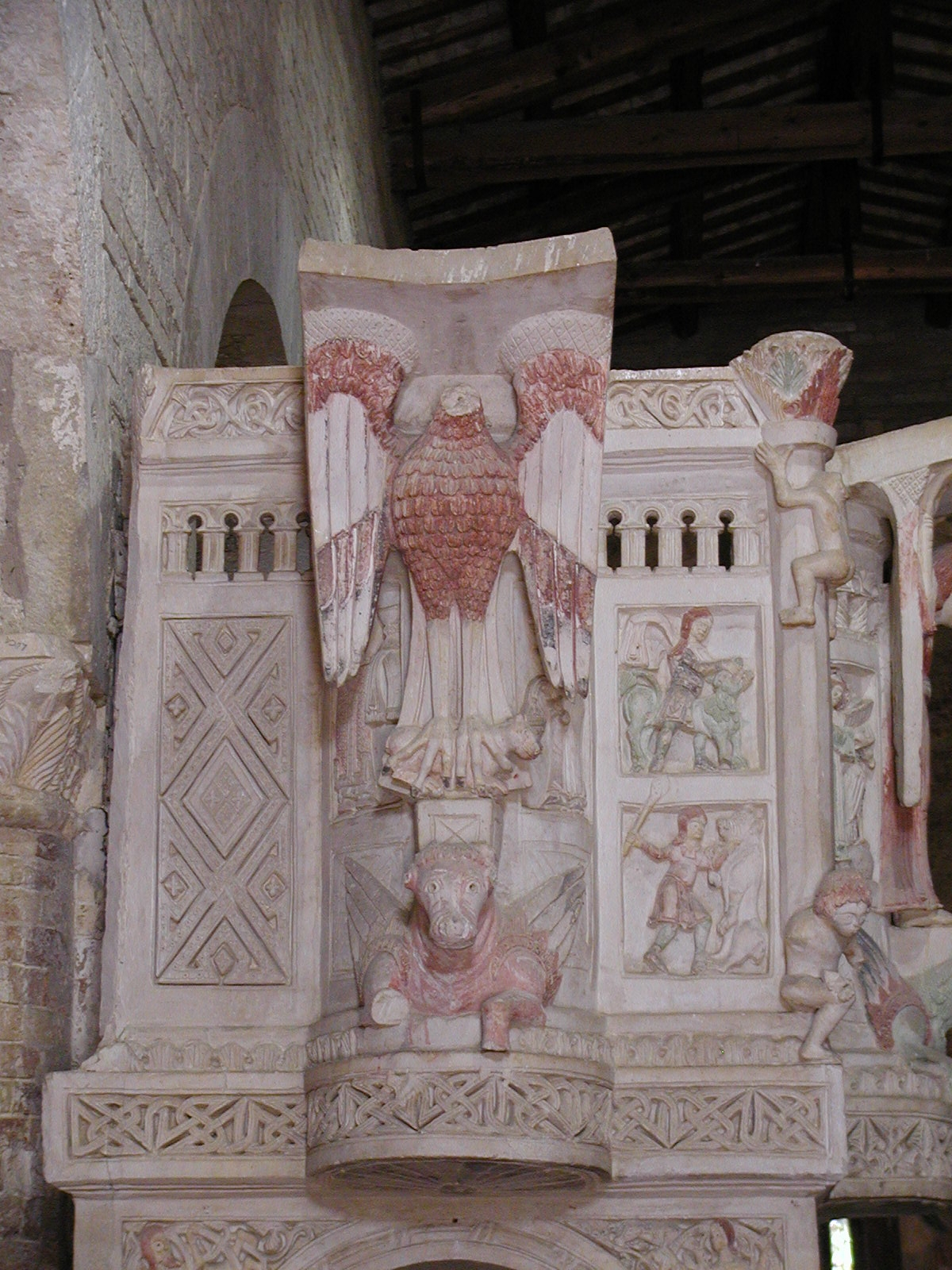 Image: Die mehrfarbige Kanzel im Detail